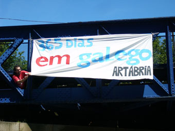 Imaxe dunha actividade da Fundaçom Artábria.